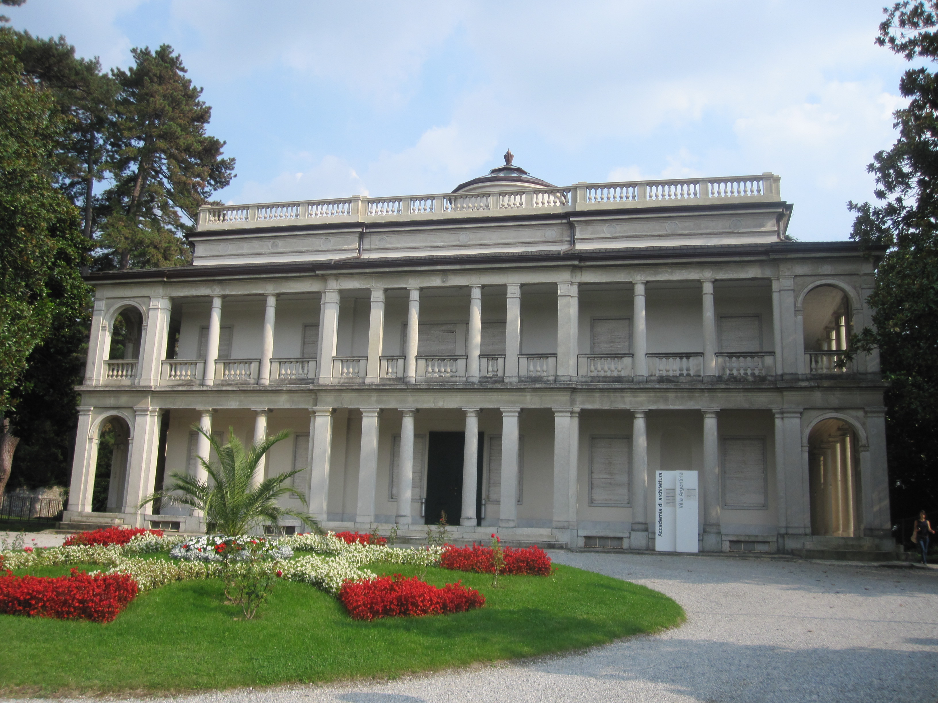 Villa Argentina (Front), Mendrisio